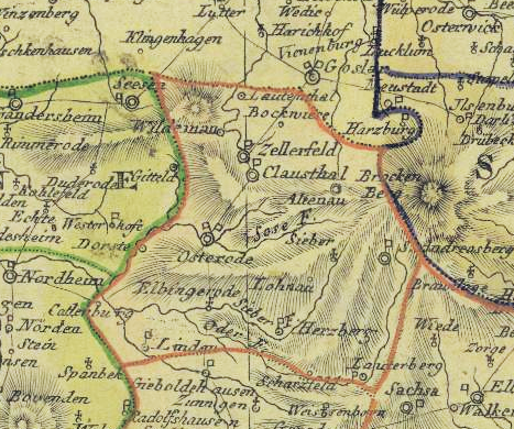 Charte vom Königreich Westphalen 1811: Kartenausschnitt District Osterode